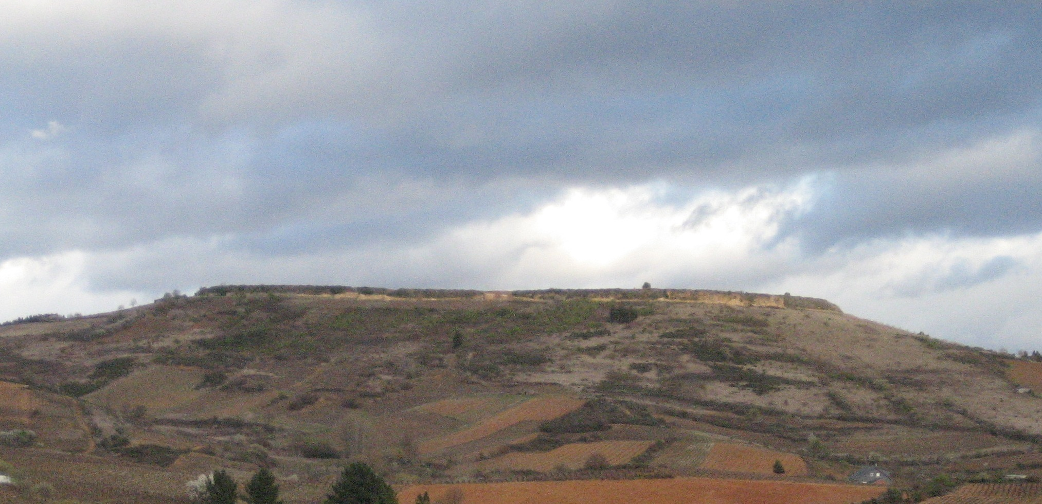 Vista de Castro Bergidum, muralla oeste